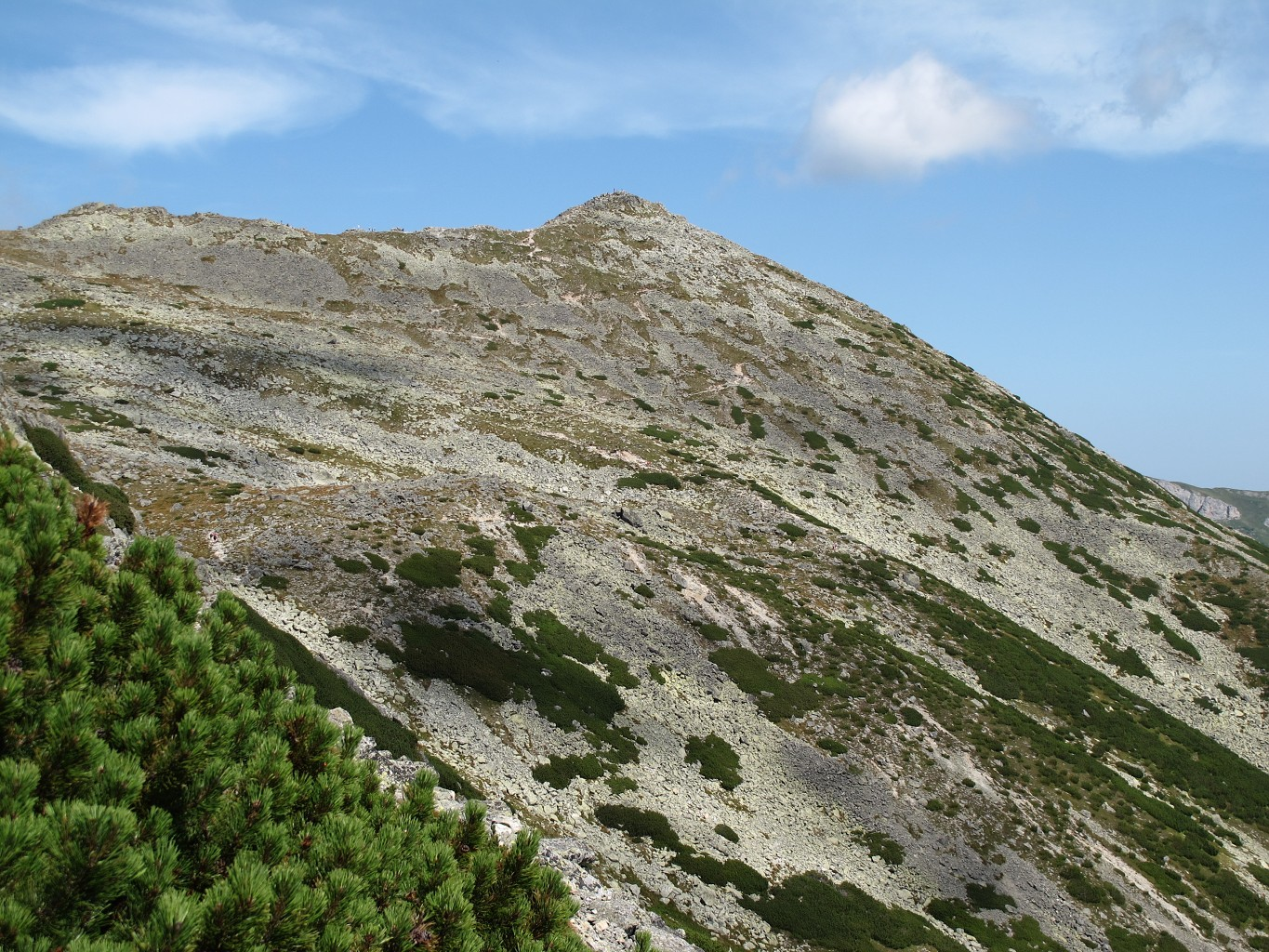 Velká Svišťovka z Tatranské magistrály